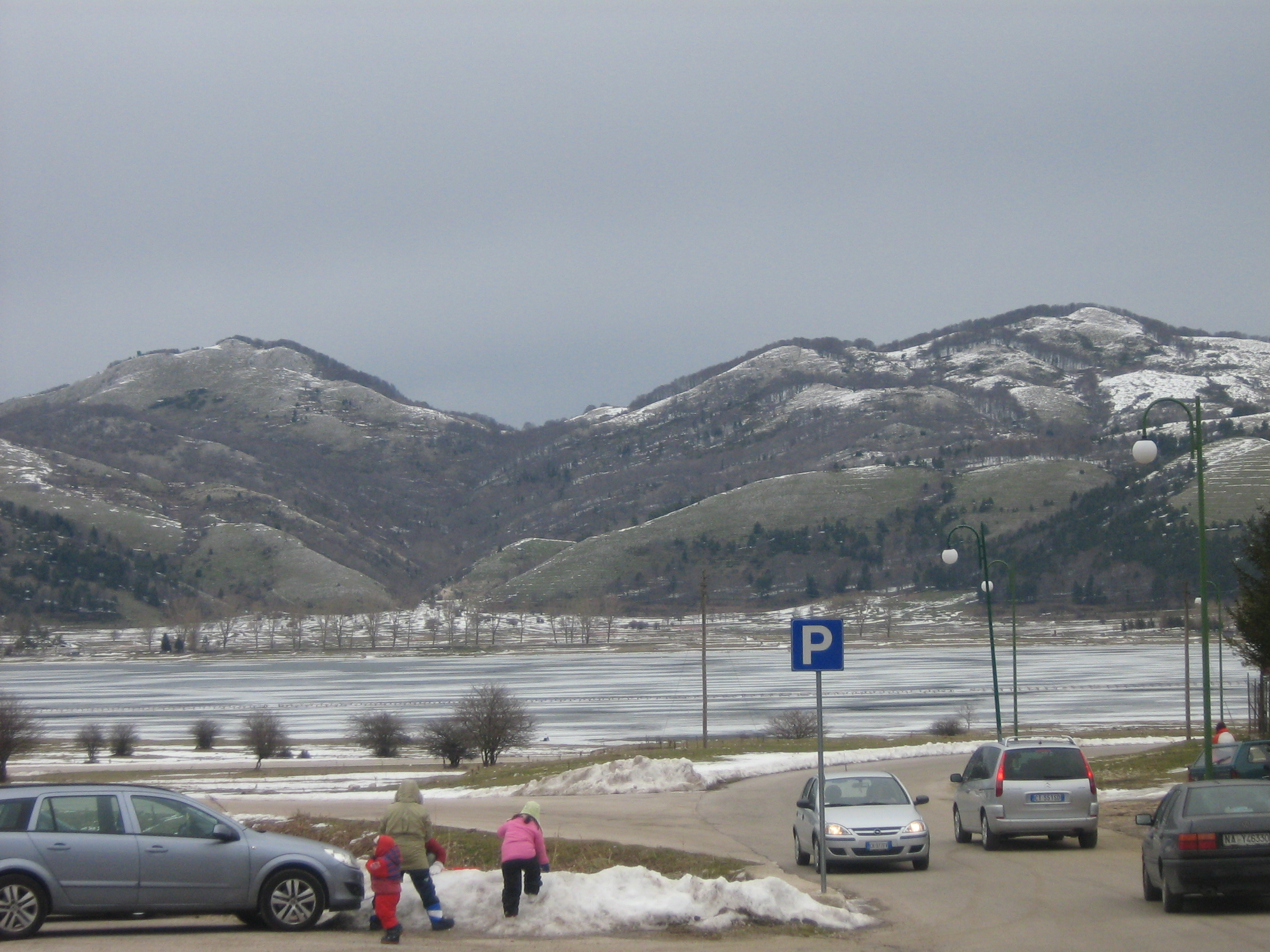 Foto scattata da me in Marzo 2008.